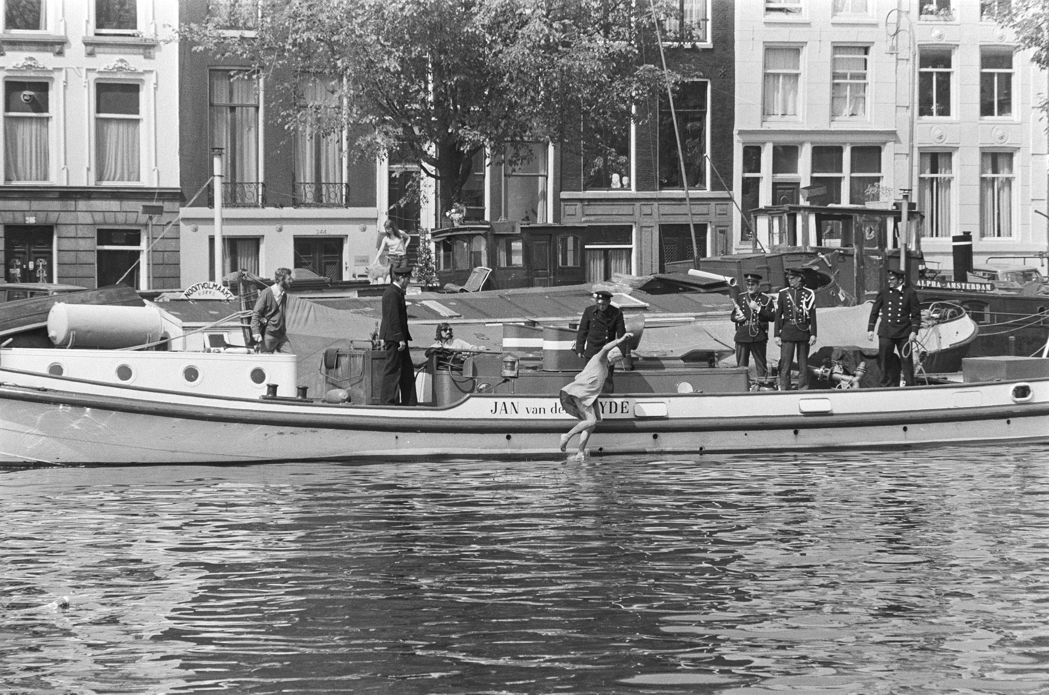 Dreharbeiten für den James-Bond-Film Diamantenfieber in Amsterdam.